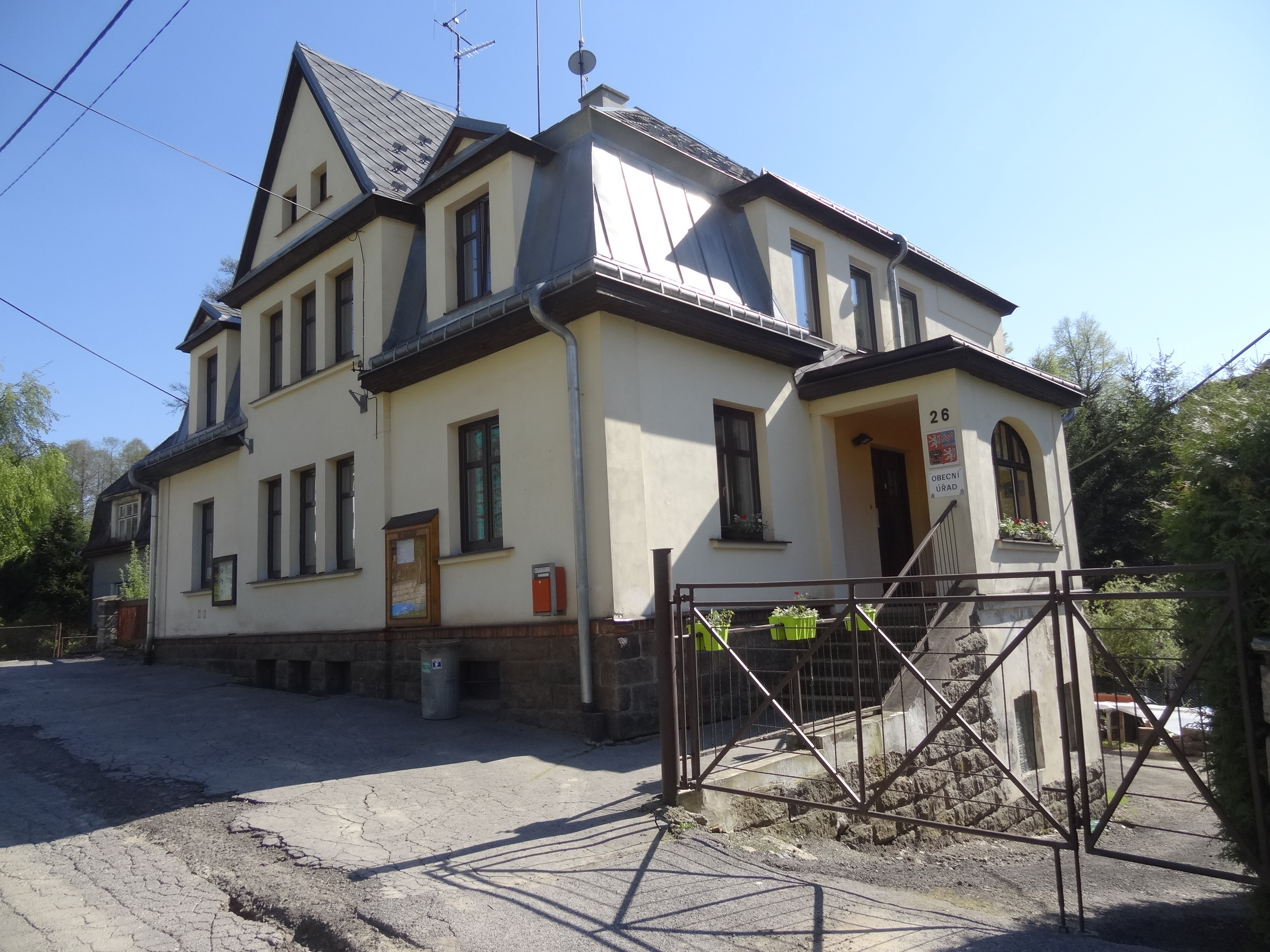 Pulečný - obecní úřad ve vilce čp. 26